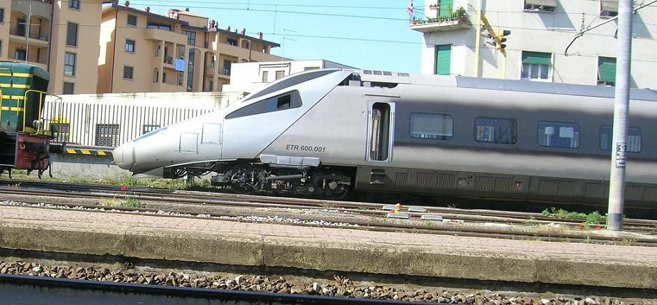 ETR 600 fermo presso la stazione di Arezzo in data 17 maggio 2007. Foto di William Perugini